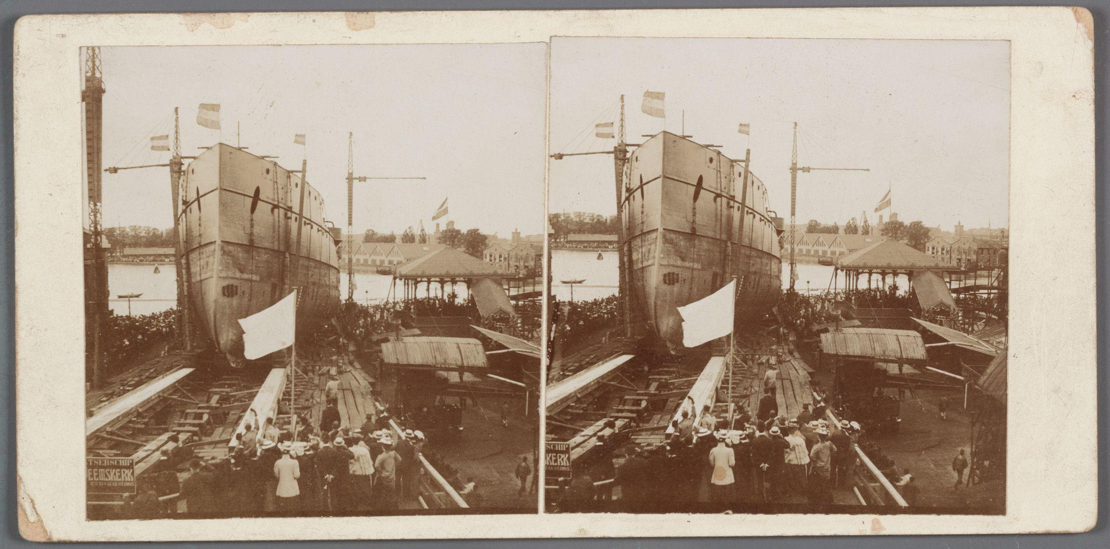 Beschrijving Grote Kattenburgerstraat 7-17c - Marine Etablissement De tewaterlating dodor Prins Hendrik van Hr. Ms. Pantserschip 'Jacob van Heemskerck' op de Rijks Marinewerf``, met het schip nog op de helling. Documenttype foto Vervaardiger Benschop``, Maarten Collectie Collectie Stadsarchief Amsterdam: stereofoto's Datering 22 september 1906 ca. Geografische naam Kattenburgerstraat Inventarissen Afbeeldingsbestand 010007000671 Generated with Dememorixer